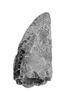 Quinkana tooth